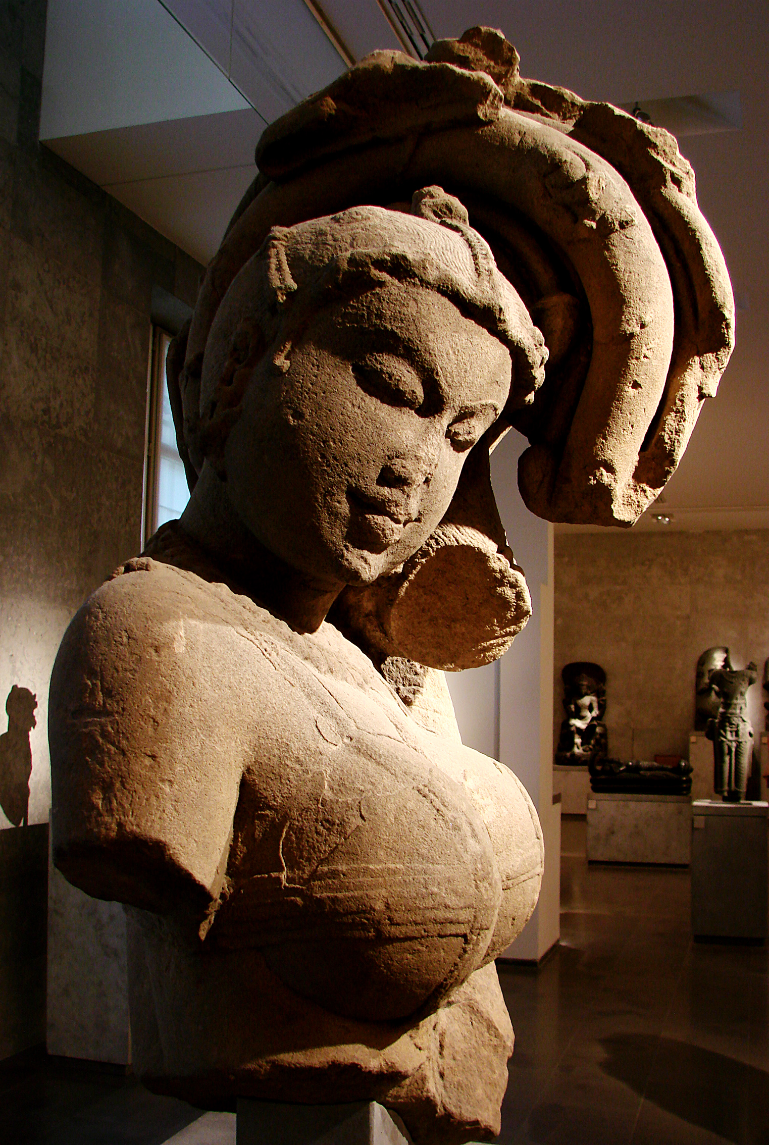 Divinité féminine à l'arbre (shâlabanjikâ). Inde, Madhya Pradesh ou Rajasthan, 10ème - 11ème siècle, grès beige, H. 78 L. 38 cm. Musée Guimet, Paris.